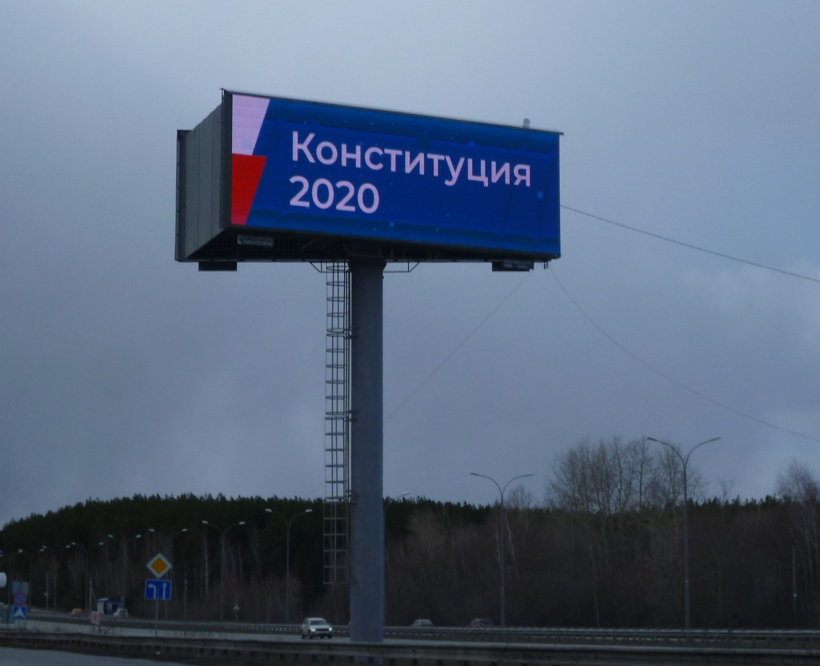 Общий щит за Конституцию Екатеринбург апрель 2020 года